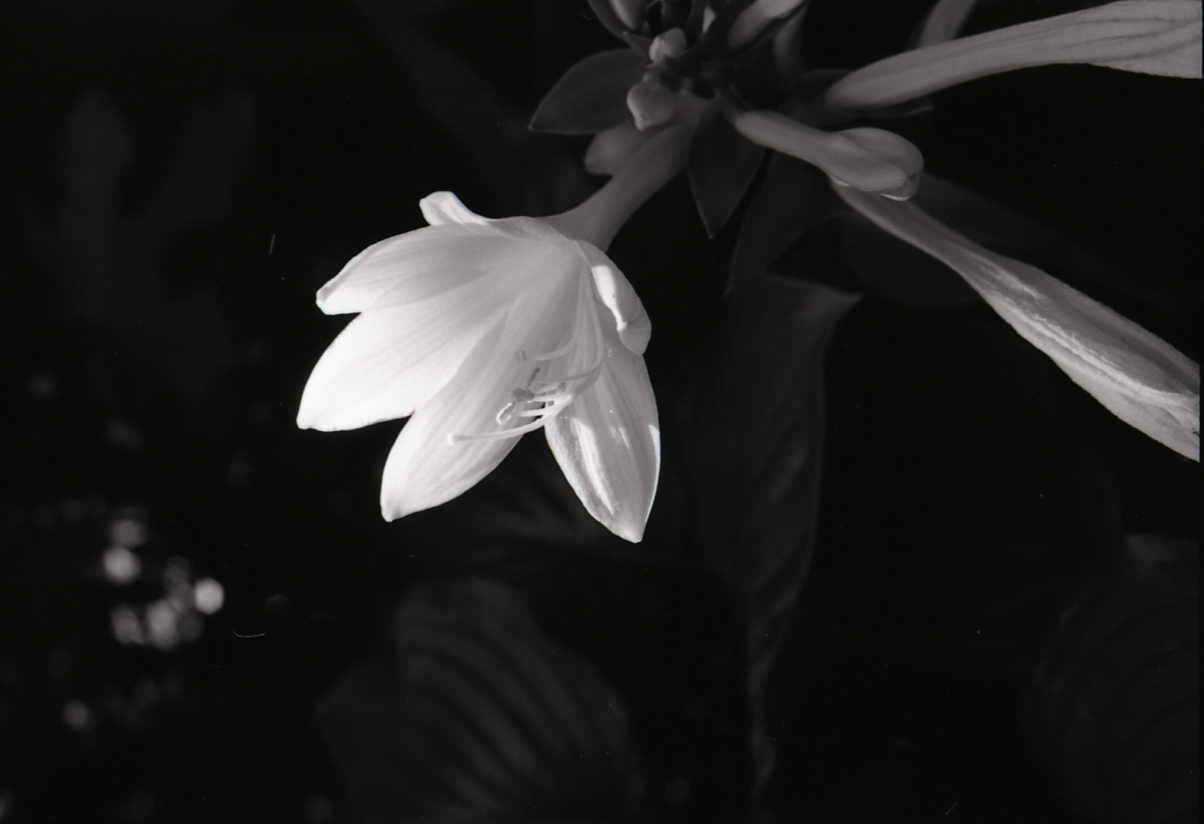 Anzola d'Ossola. Ricerche personali: ombre, foglie, finestra, lamiera. Serie fotografica : Anzola d'Ossola, 1972 / Paolo Monti. - Strisce: 4, Fotogrammi complessivi: 20 : Negativo b/n, gelatina bromuro d'argento/ pellicola ; 35 mm. - ((Sul portanegativi: NIKMAT PanF. - Fonte: Agenda di Paolo Monti: Leica 1501-3000 Controllo numerazione (1950-1978), presso Archivio Paolo Monti